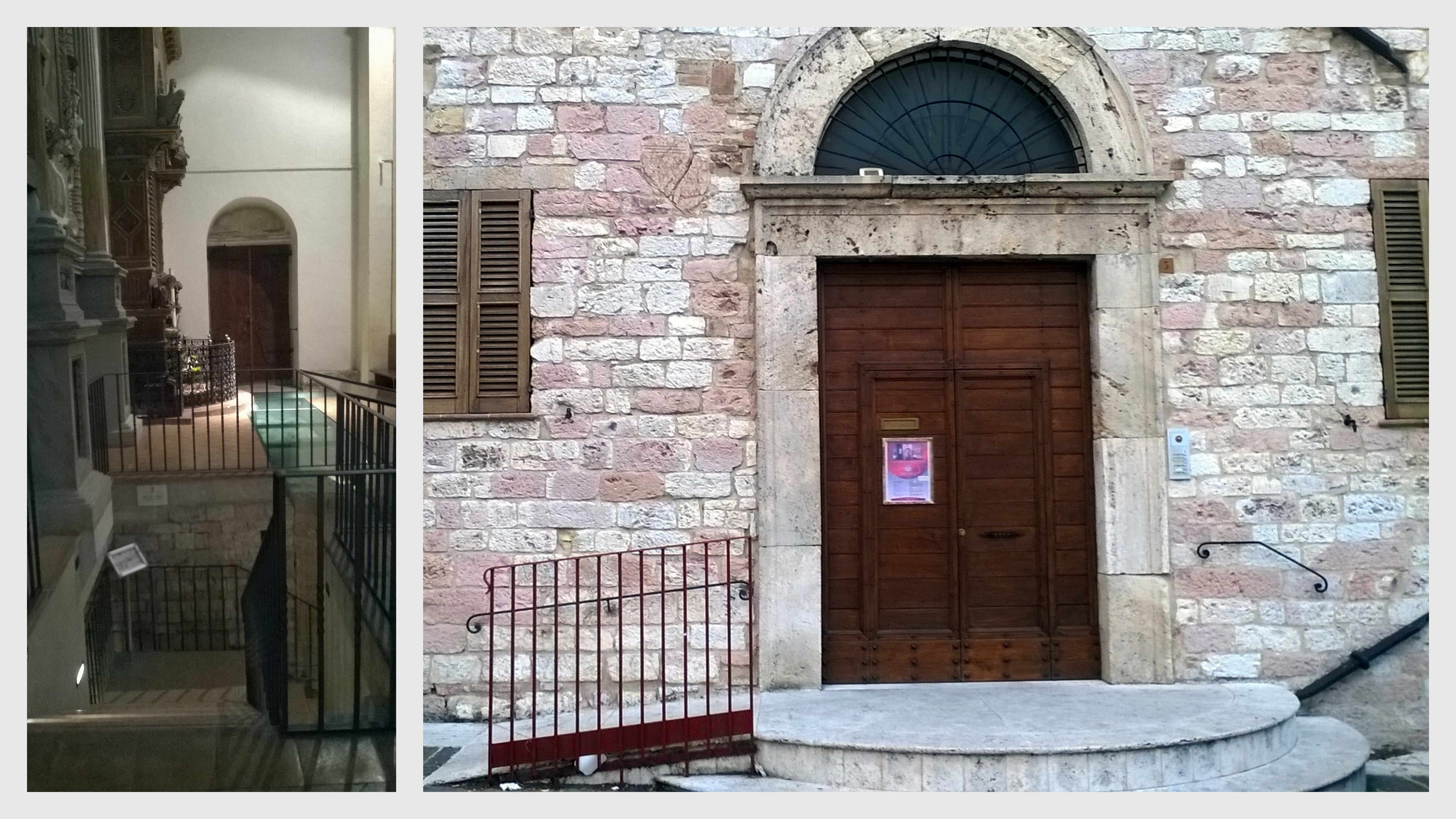 L'accesso al Museo dalla Cattedrale e quello dal Palazzo dei Canonici in Piazza San Rufino